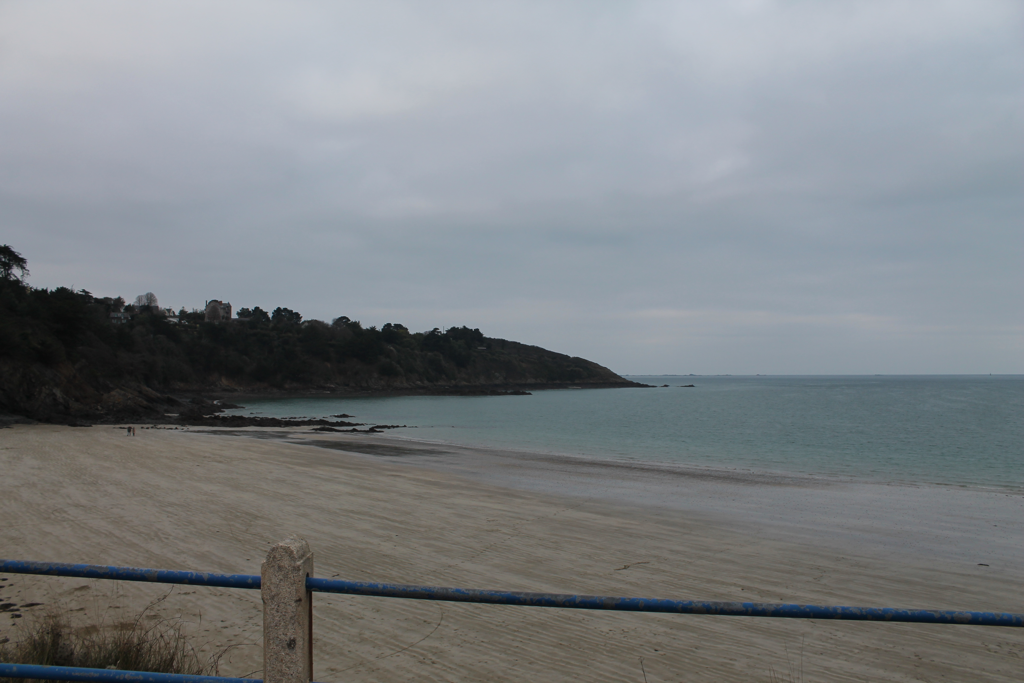 Binic - Plage de l'avant port